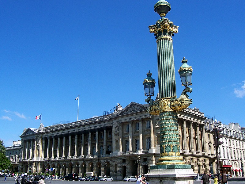 Parigi - Place de la Concorde